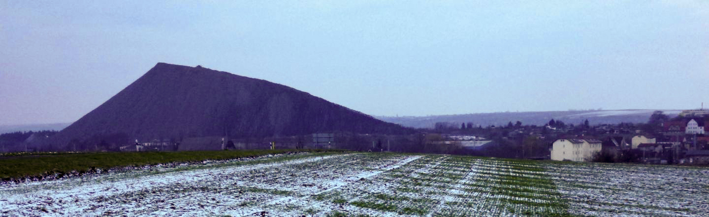 Kalihalde nördlich des Bahnhofs Teutschenthal